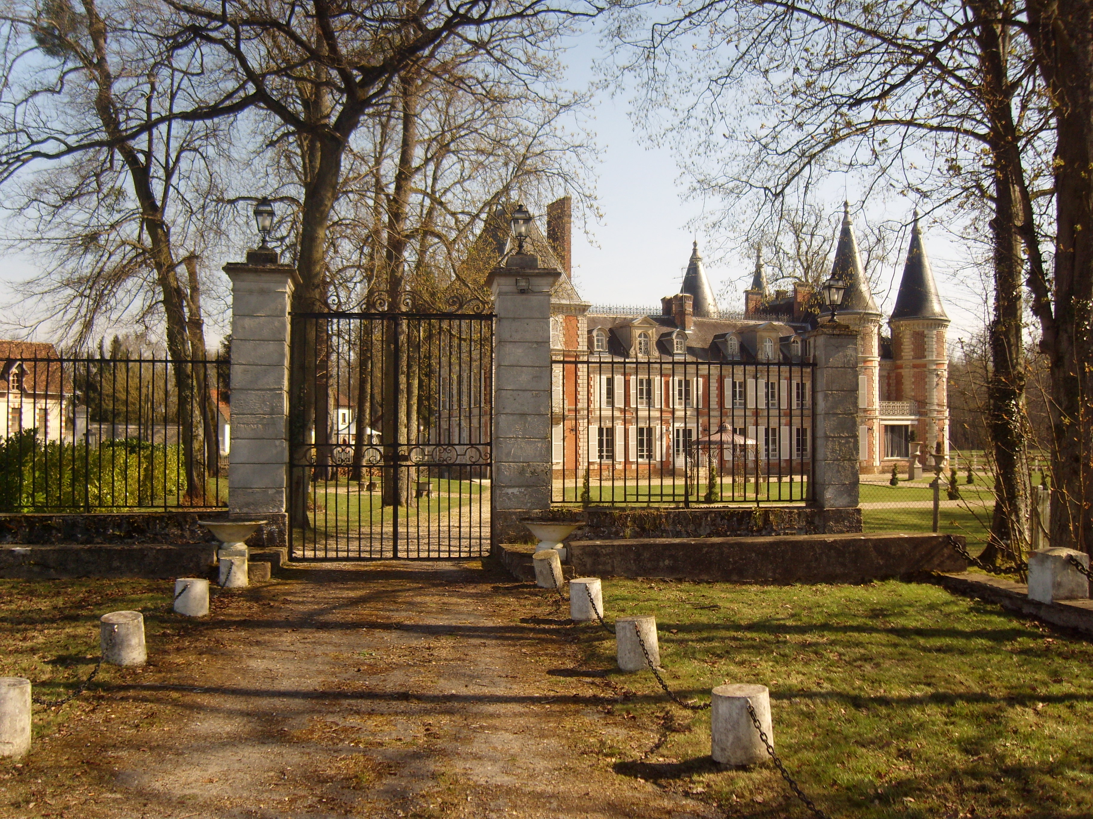 Château de la Plumasserie et portail